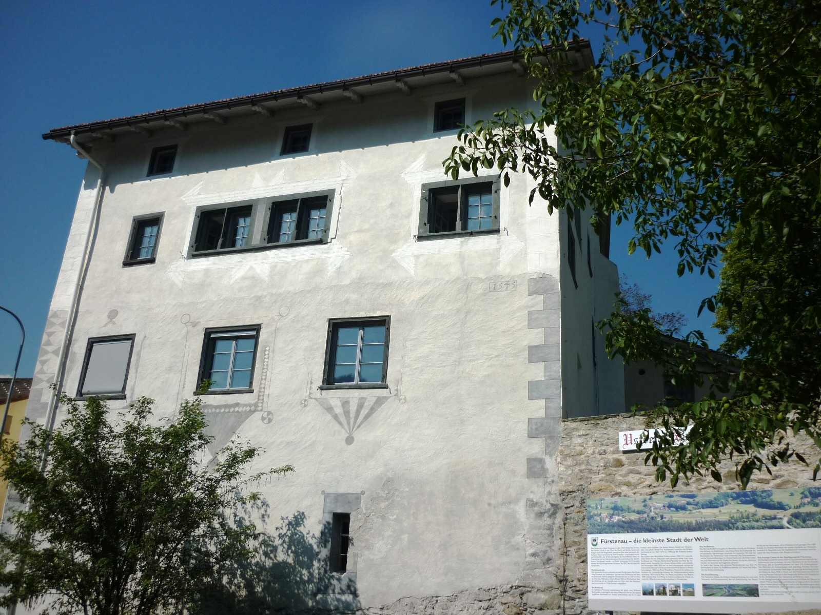 Stoffelhaus, Fürstenau GR, Schweiz